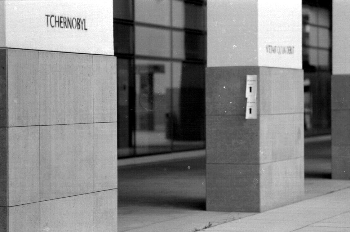 Pour le 20ème anniversaire de l'accident de Tchernobyl, des inconnus taggent l'entrée de l'EPFL, pour protester "contre les expériences de fusion nucléaire qui s'y déroulent". Le tag dit "Tchernobyl n'était qu'un début". (Il y a un réacteur nucléaire expérimental classique à 200 mètres de là, et un laboratoire P3 destiné à l'étude de maladies infectieuses, mais il semble que l'"action" ne les visait pas).